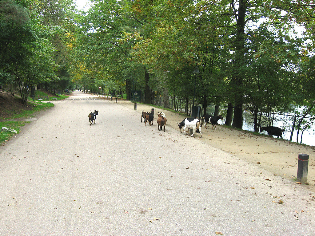 500px provided description: Center Parcs De Kempervennen [#Nederland ,#Holidays ,#Netherlands ,#Niederlande ,#Center Parcs ,#De Kempervennen]